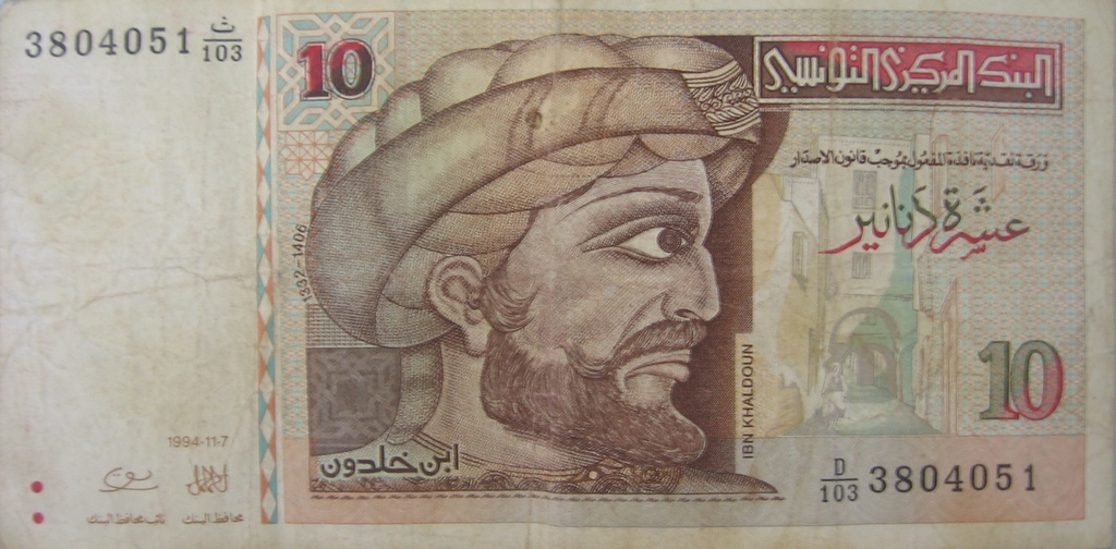 10 dinarów tunezyjskich - awers